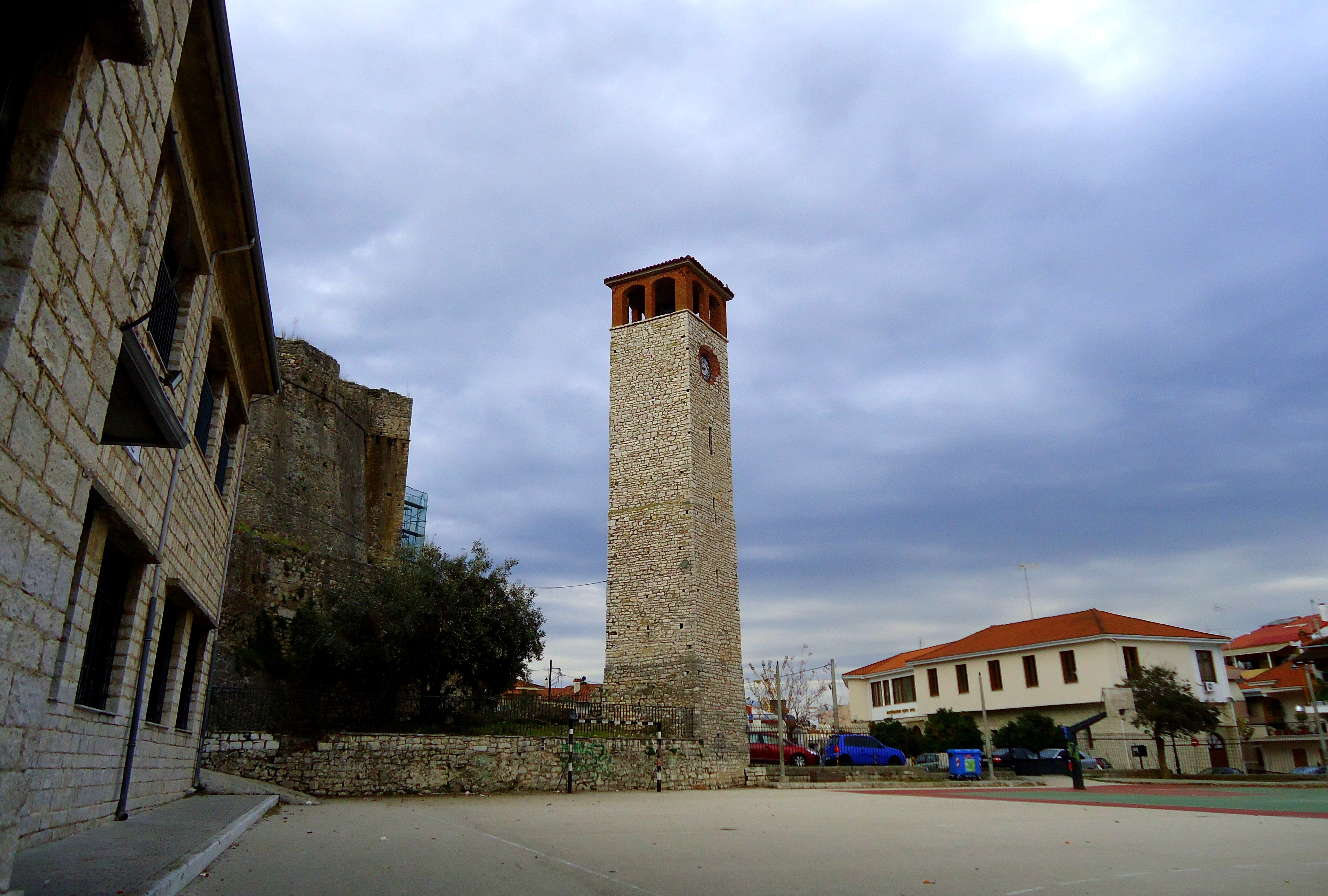 Ο πύργος του ρολογιού και το Κάστρο της Άρτας.